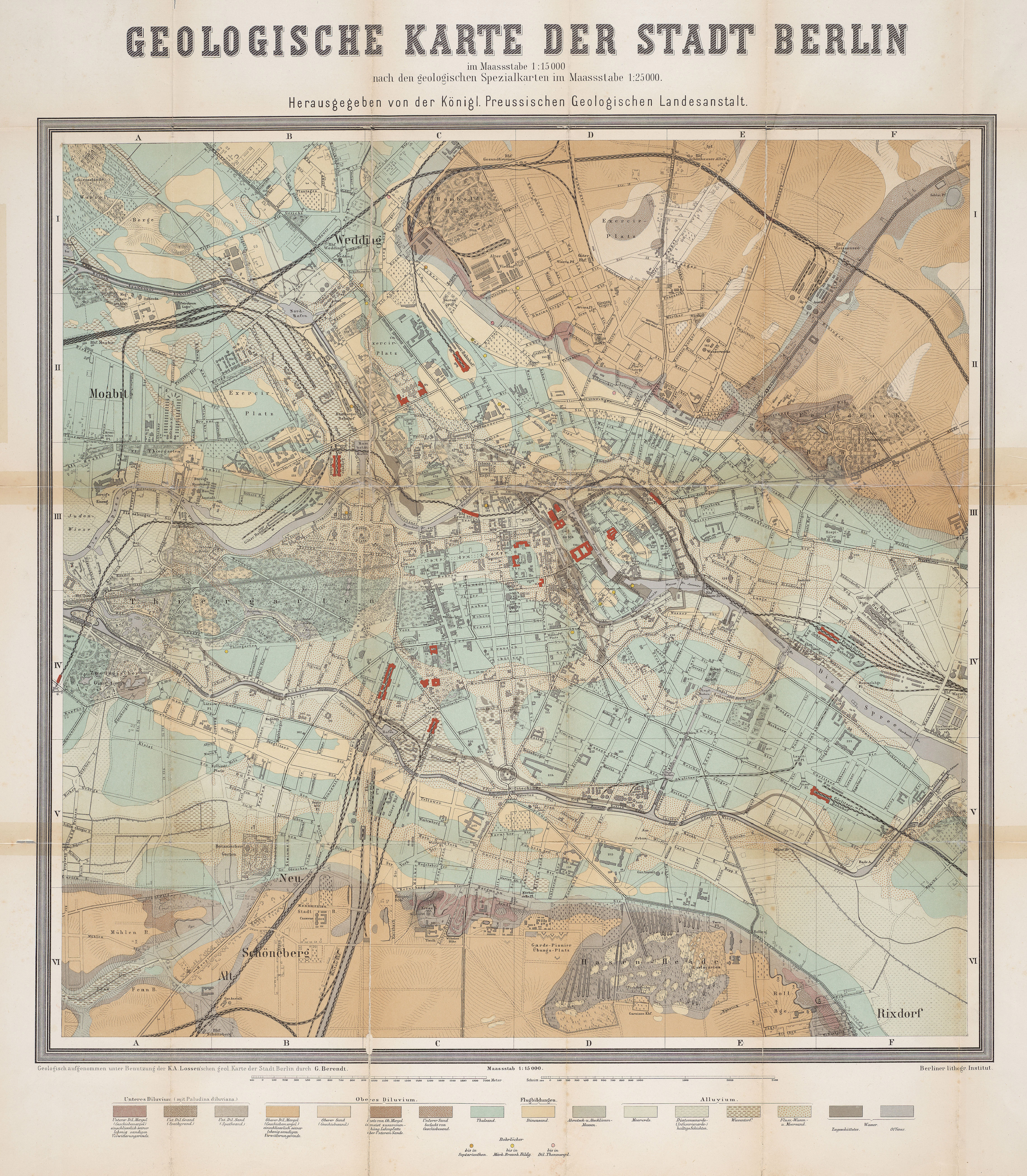 Der Titel steht 4-zeilig über dem Plan. Der Zusatz bezüglich der Autoren hier direkt unter dem Plan: "Geologisch aufgenommen unter Benutzung der K.A. Loss'schen geol. Karte der Stadt Berlin durch G. Berendt". Darunter zwei Maßstabsleisten über 2000 Meter und 2500 Schritt sowie eine Legende mit 16 Farbkästen für die verschiedenen geologischen Formationen. Der Plan ist unterteilt in Planquadrate A-F und I-VI. Dem Begleitheft zufolge wurde die Karte durch die Simon Schropp'sche Hoflandkartenhandlung vertrieben.